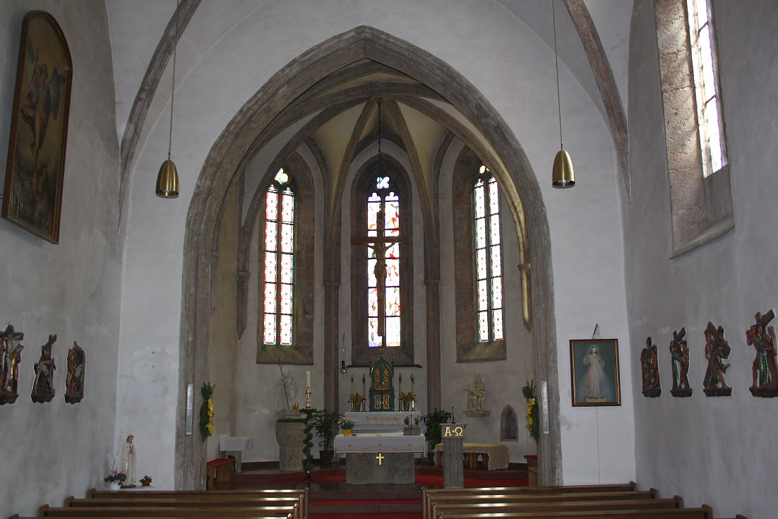 Die Innenansicht der Pfarrkirche in der niederösterreichischen Gemeinde Kaumberg.